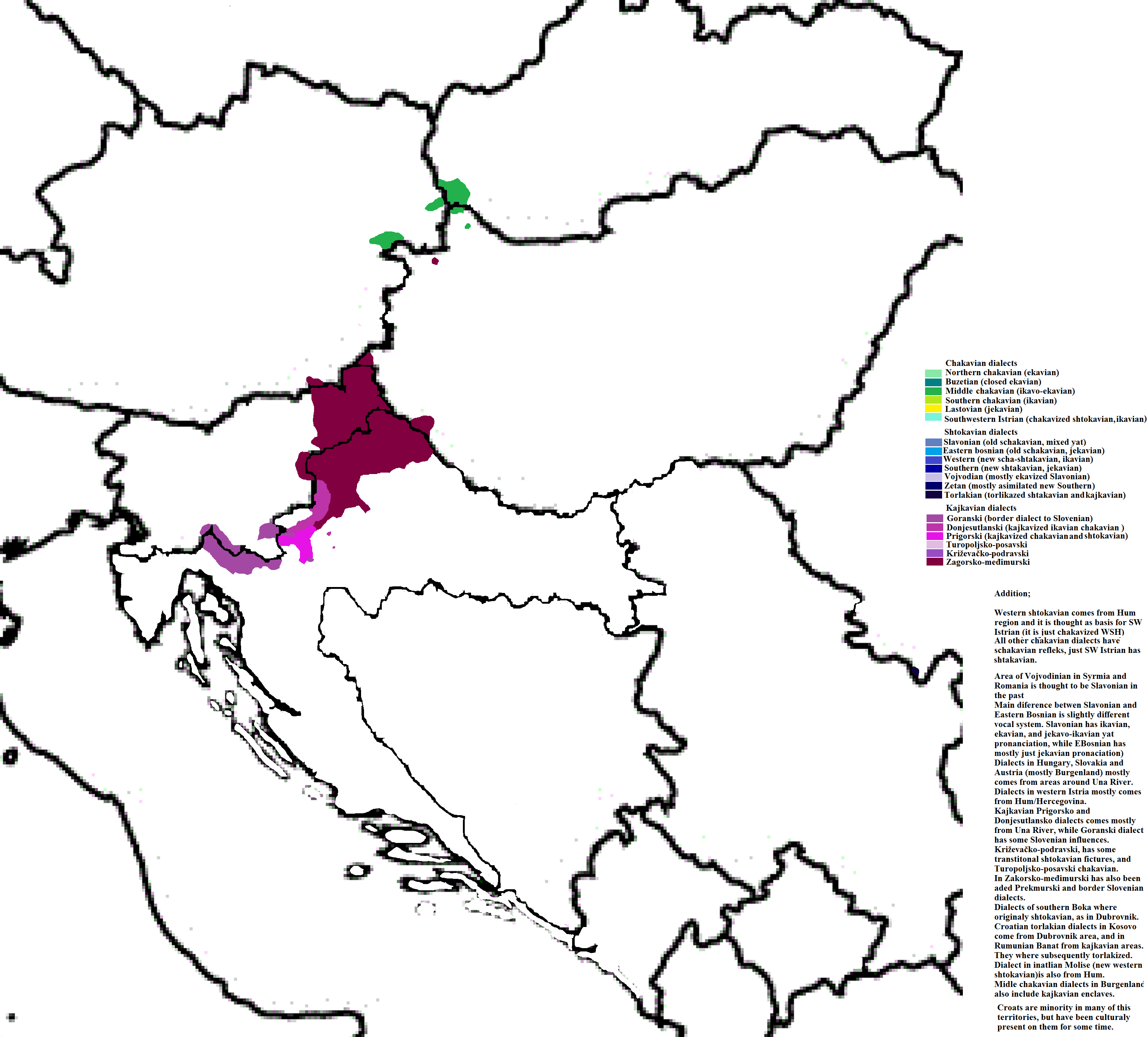 sjeverozapani kajkavski (zagorsko-međimurski) i povezani dijalekti; na sjeveru gradišća srednječakavski obuhvaća i originalno kajkavske govore koji su kasnije (srednje)čakavizirani donjesutlanski je originalno kajkaviziran južnočakavski (većinom pod zagorsko-međimurskim utjecajem)